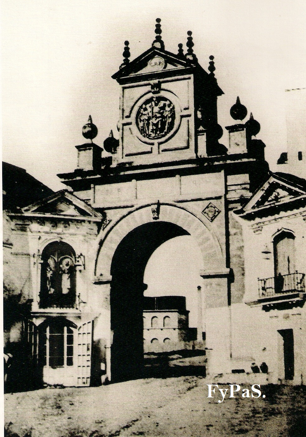 Puerta Real de Sevilla, fotografiada por Joseph de Vigier (1821-1894)(Calotipo) 1850